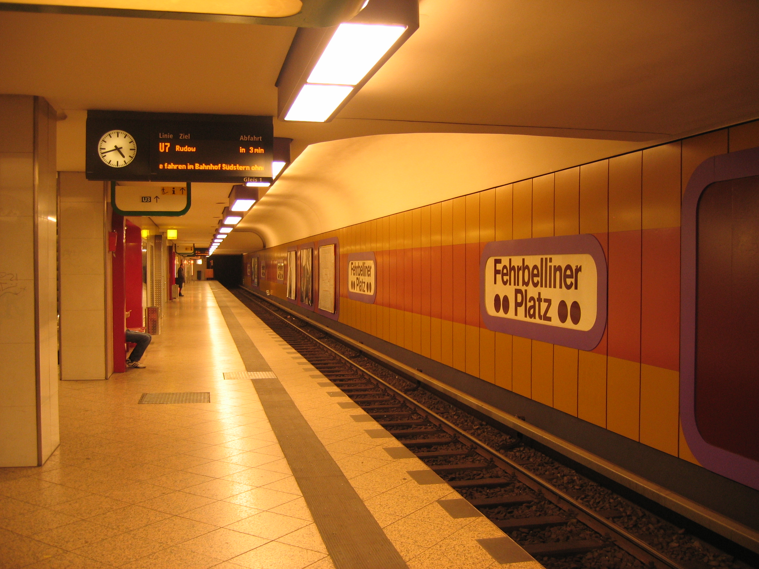 Der U-Bahnhof Fehrbelliner Platz in Berlin